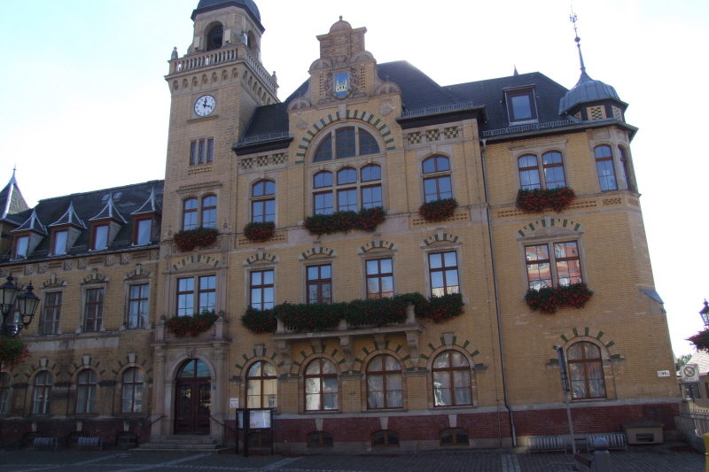 Rathaus Bad Lausick Fotograf: Harald Rossa Datum: Oktober 2006 Höher aufgelöste Version ist verfügbar